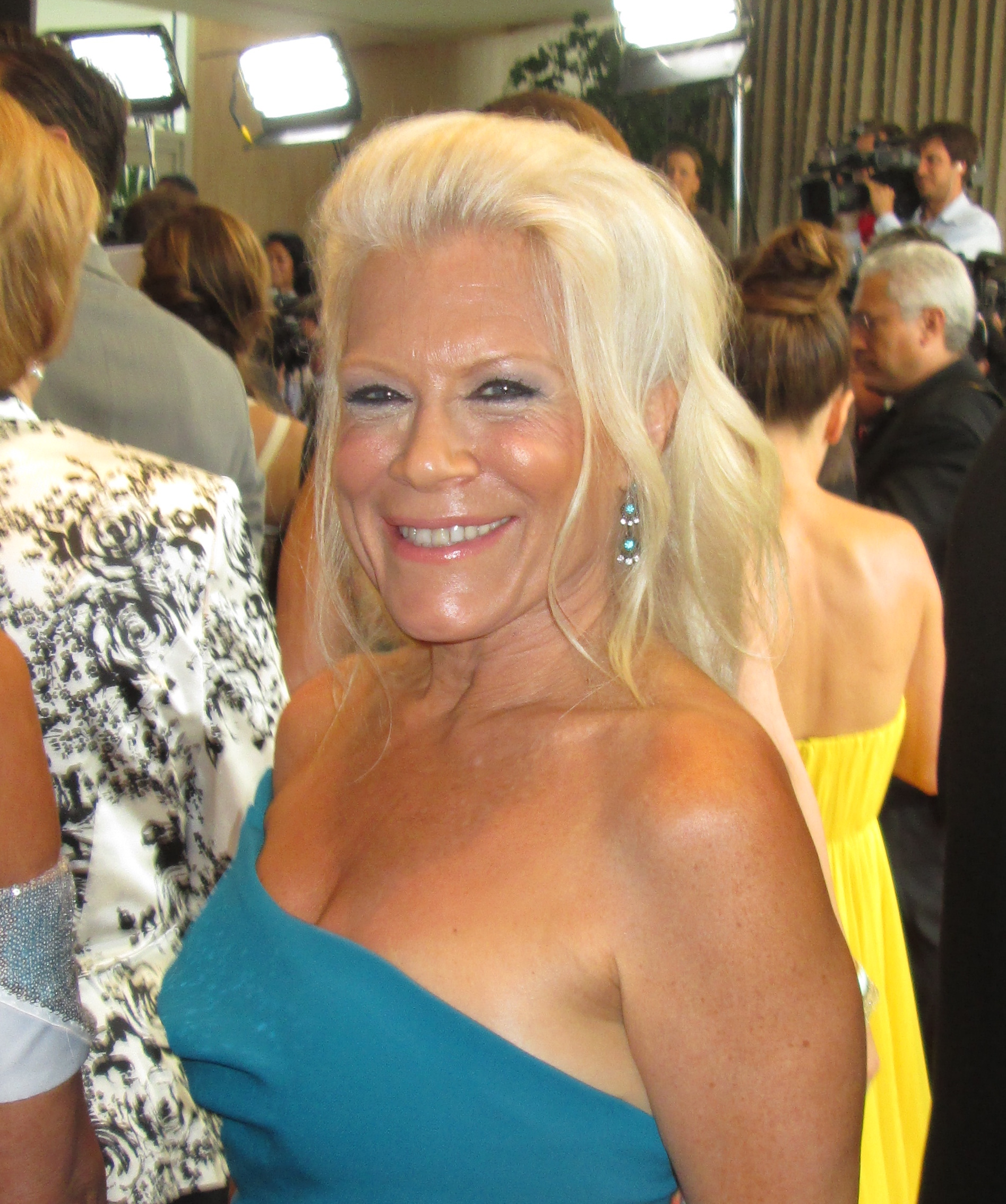 Ilene Kristen at 2014 Daytime Emmys